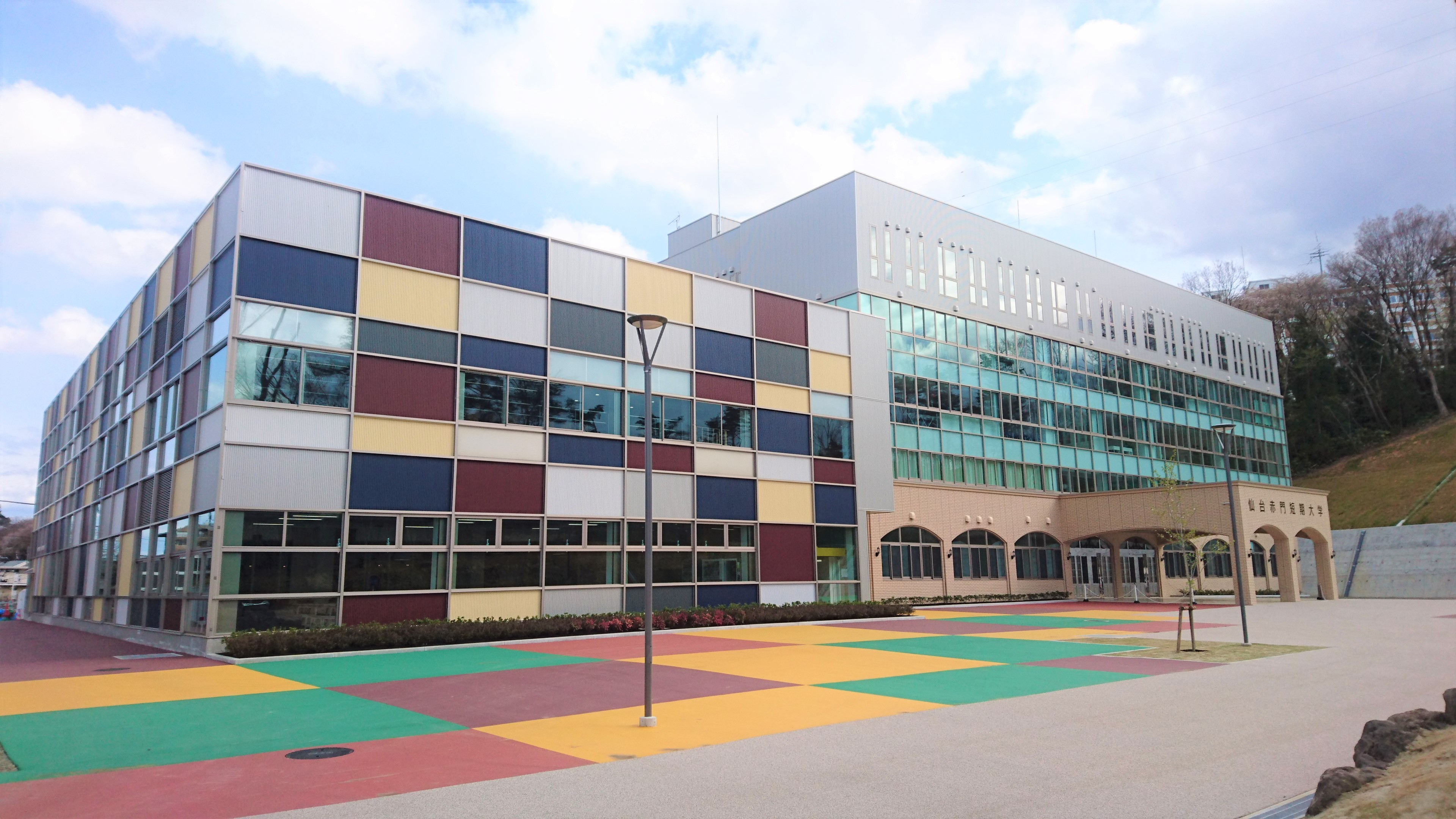 仙台赤門短期大学外観写真